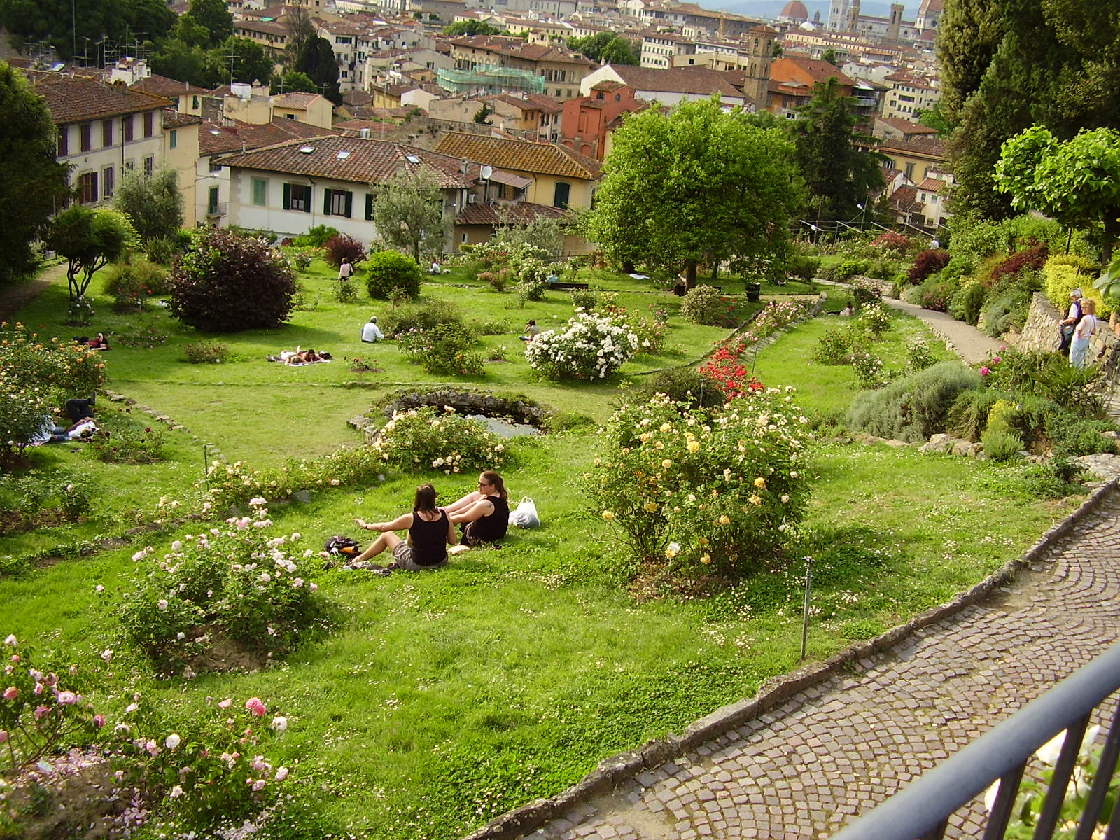 Giardino delle Rose in Florence, Italy